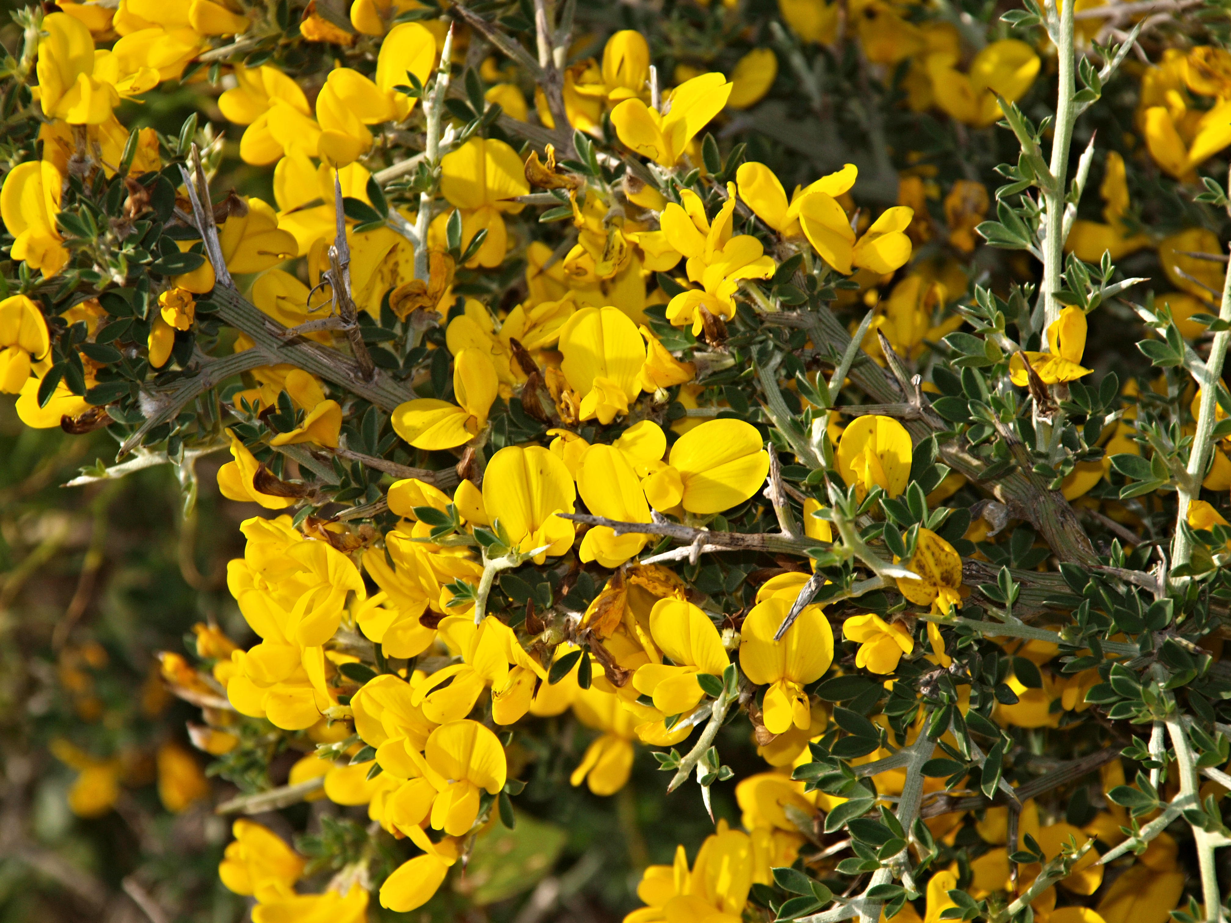 Morsiglia (Corsica) - Genêt de Corse (genista corsica)